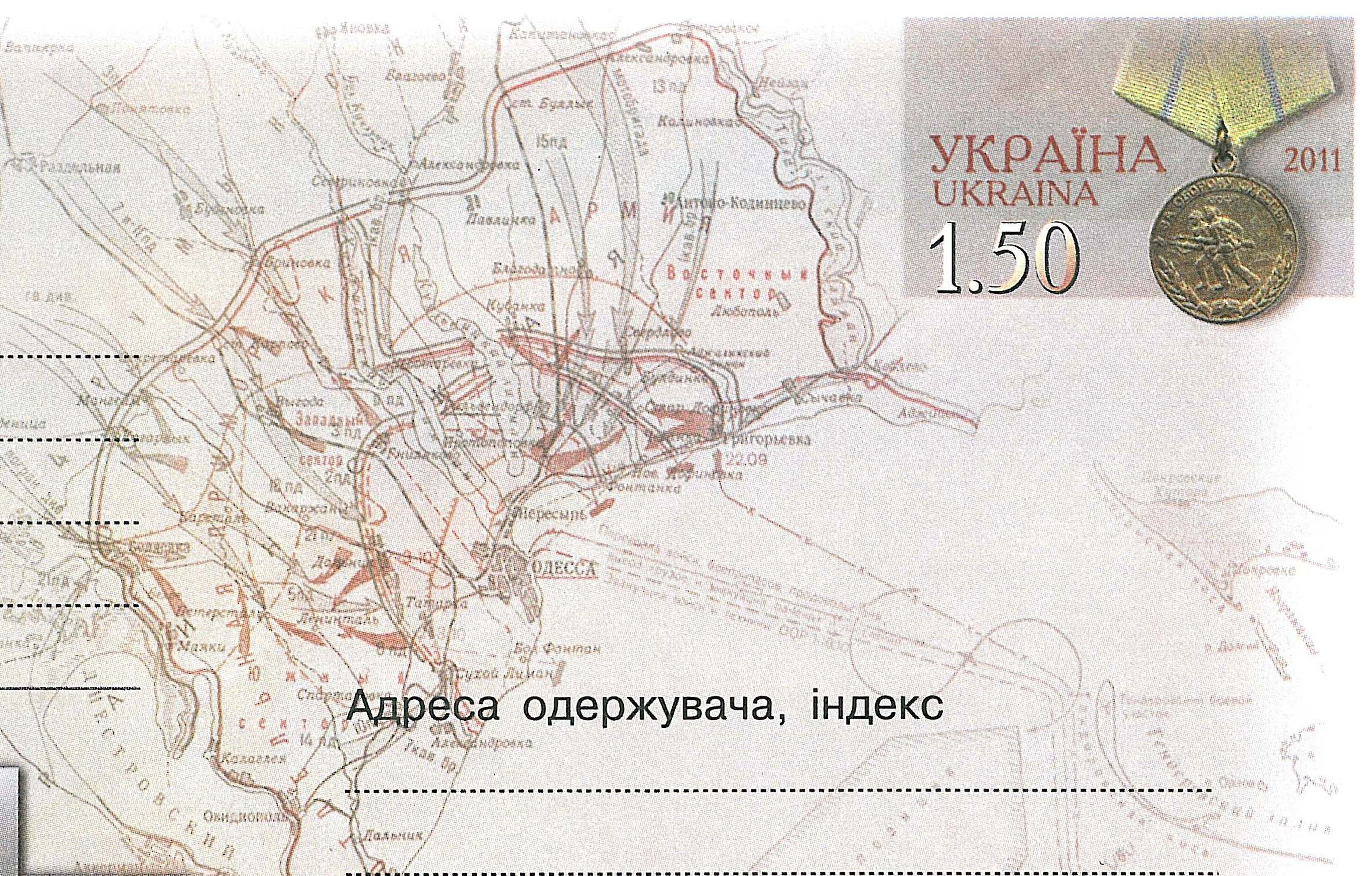 70 лет обороны Одессы (1941). Оригинальная почтовая марка. Укрпочта, 2011. На марке изображена советская медаль "За оборону Одессы".